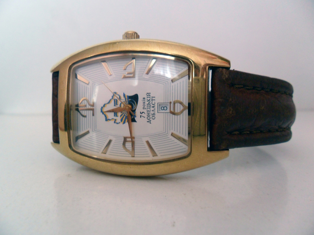 Наручные часы "KLEYNOD" Киевского часового завода. Выпущены ограниченной серией к 75-и летию Донецкой области в 2007 году.